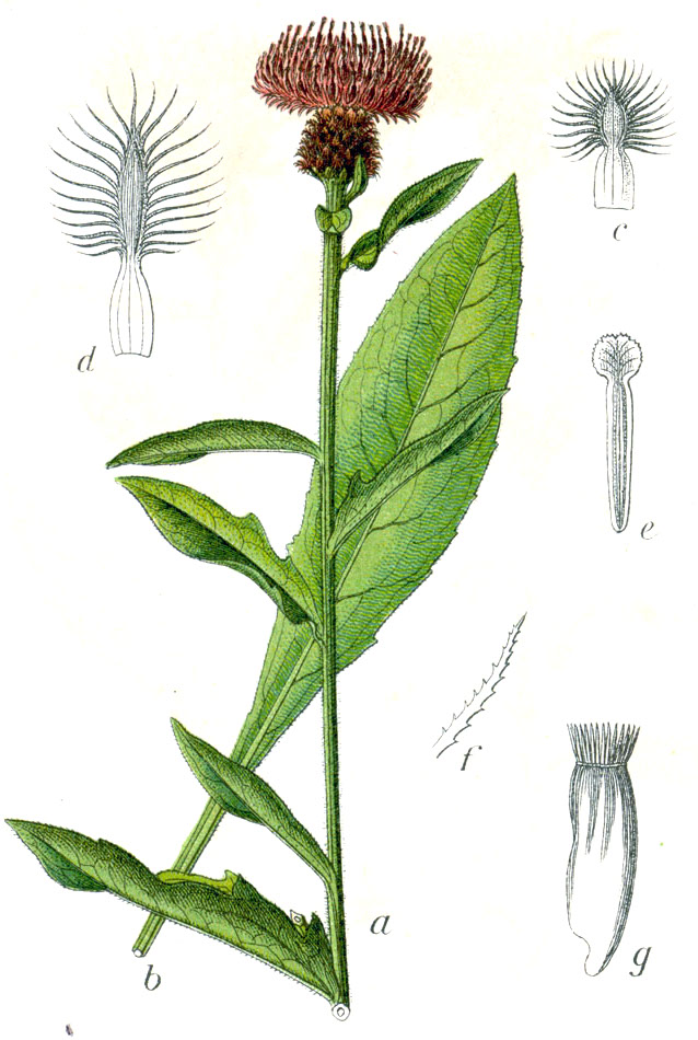 Centaurea nigra L. s. l. Original Caption Schwarze Flockenblume, Centaurea nigra